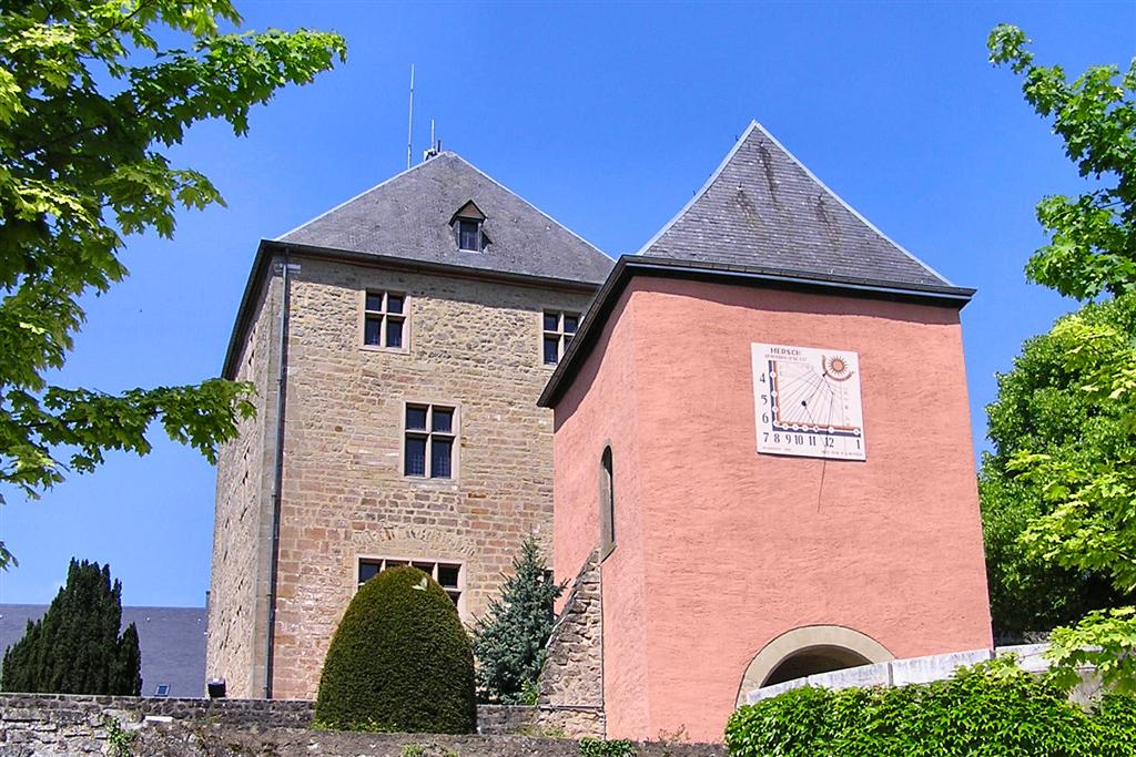 Le château de Mersch (Luxembourg)